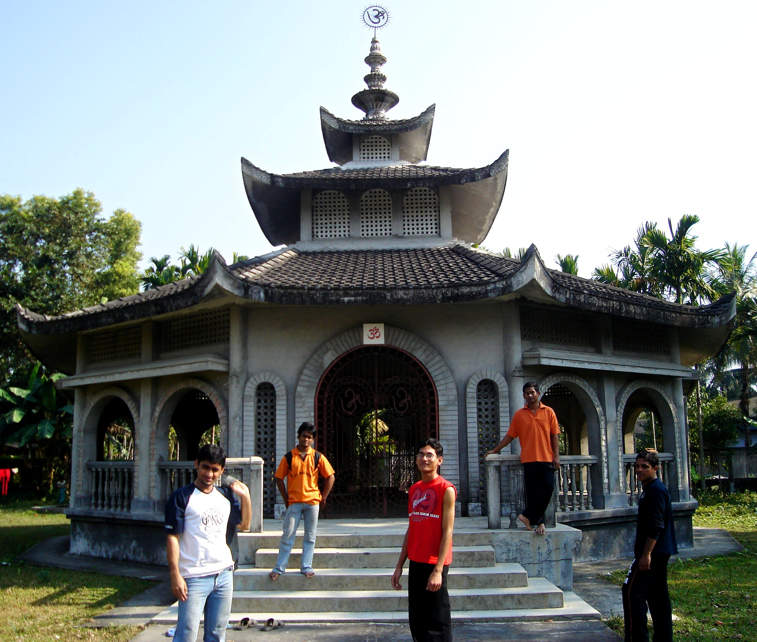 @ Brahma Mandir, Kokrajhar